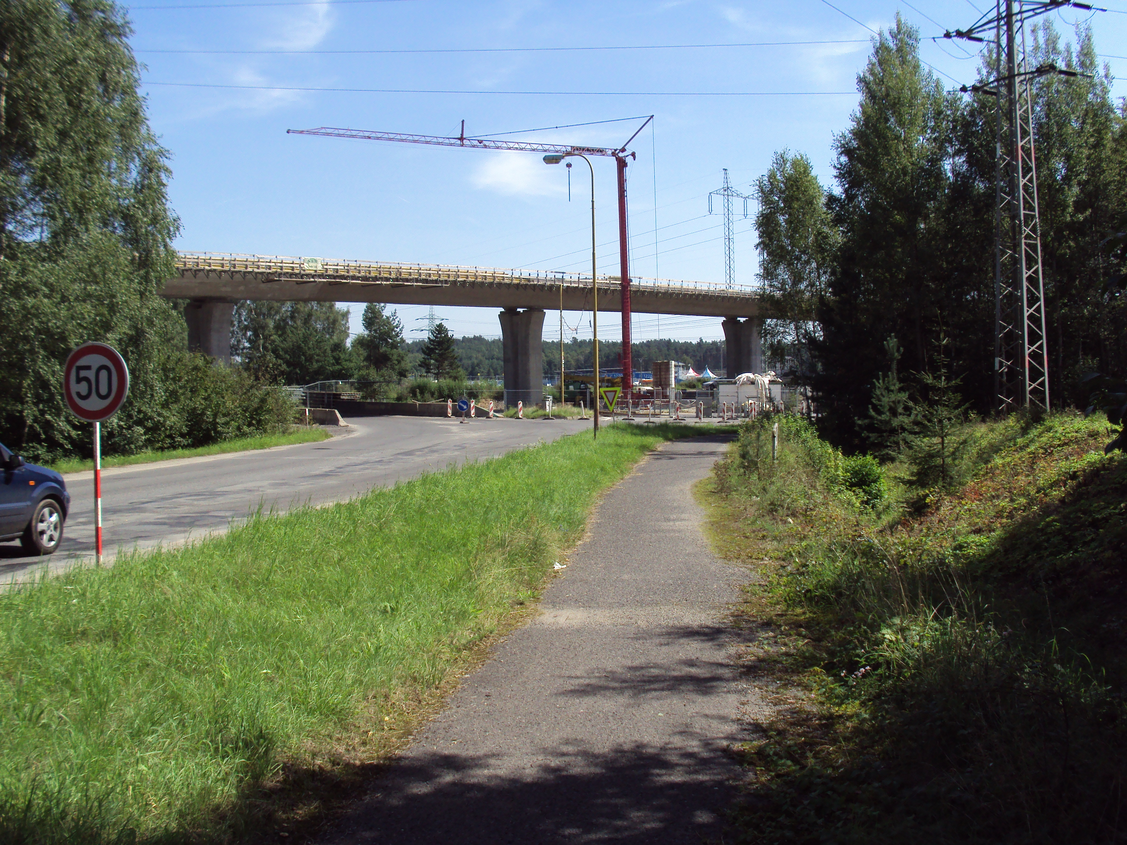 Stavba silničního obchvatu České Lípy u obce Sosnová, v srpnu 2010 vládou zastavená